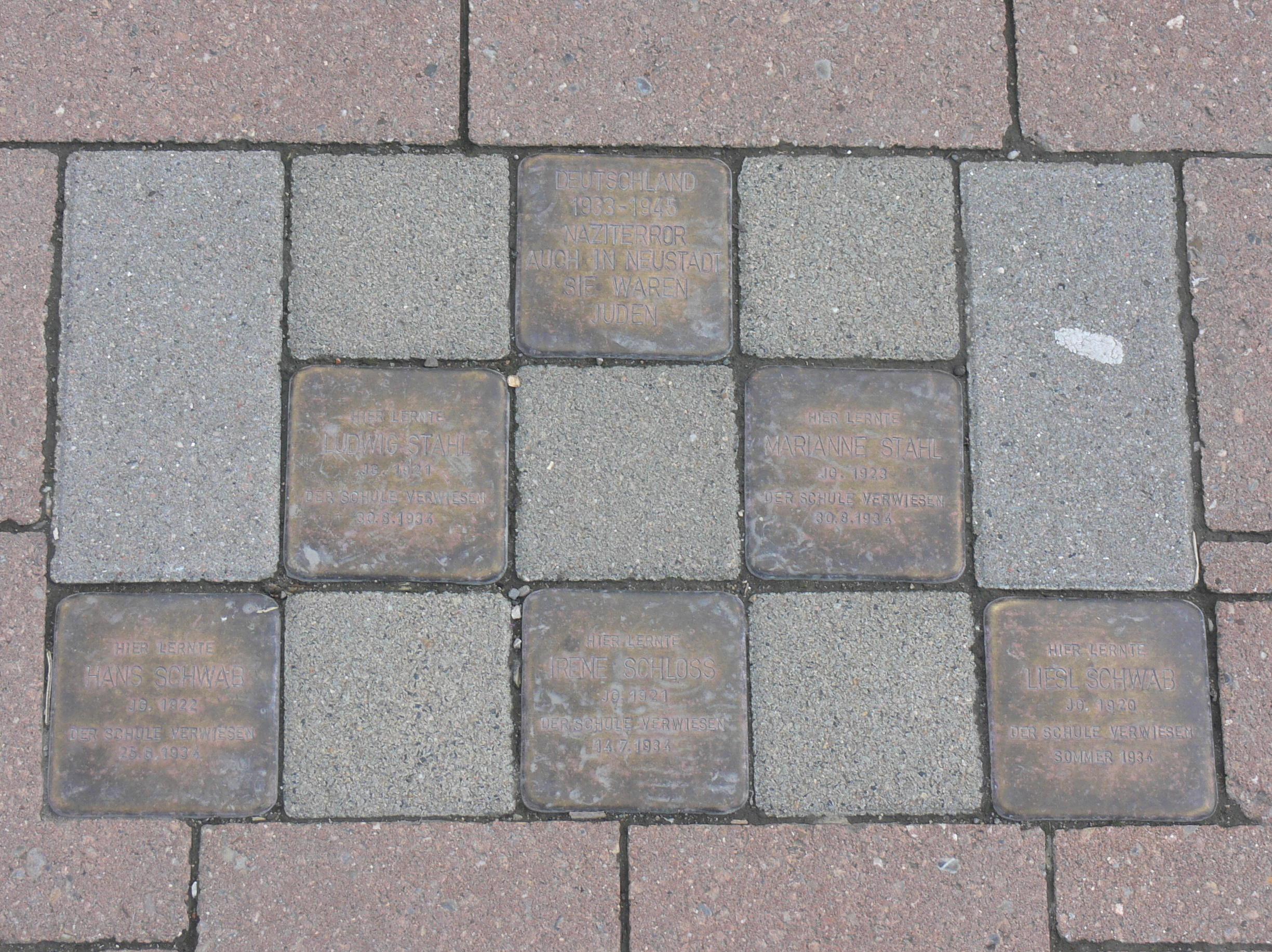 Stolpersteine am Schulzentrum, Comeniusstraße 4, Neustadt an der Aisch, Mittelfranken, Bayern, Deutschland